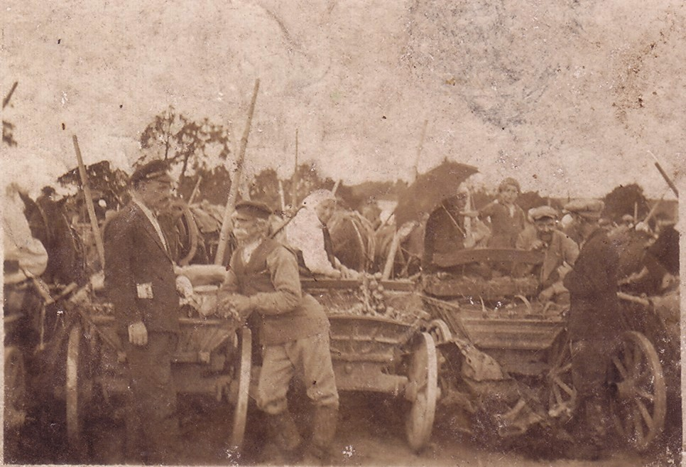 Беларуская (тарашкевіца): Кемелішкі (Kiemieliški)